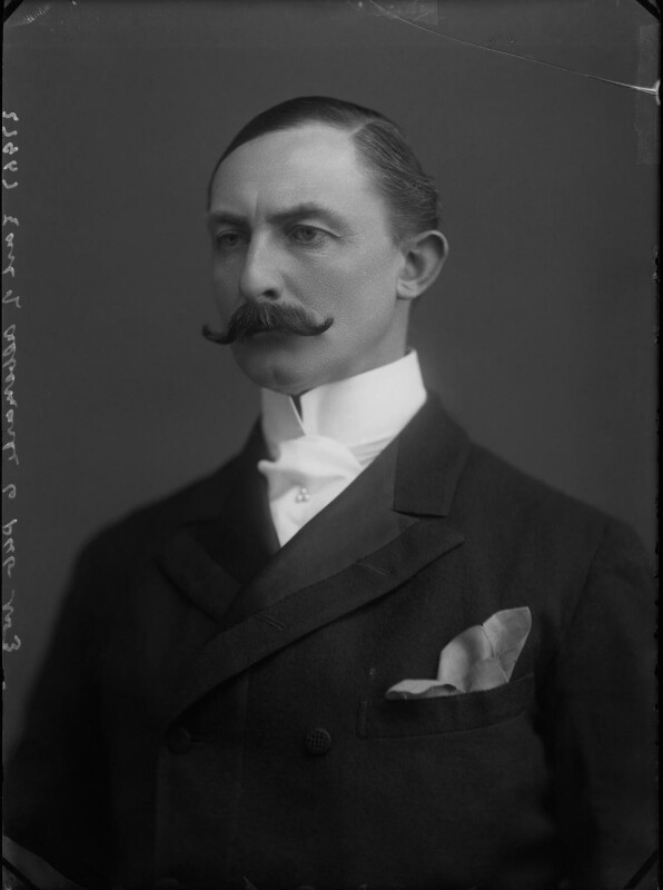 Lord Albemarle